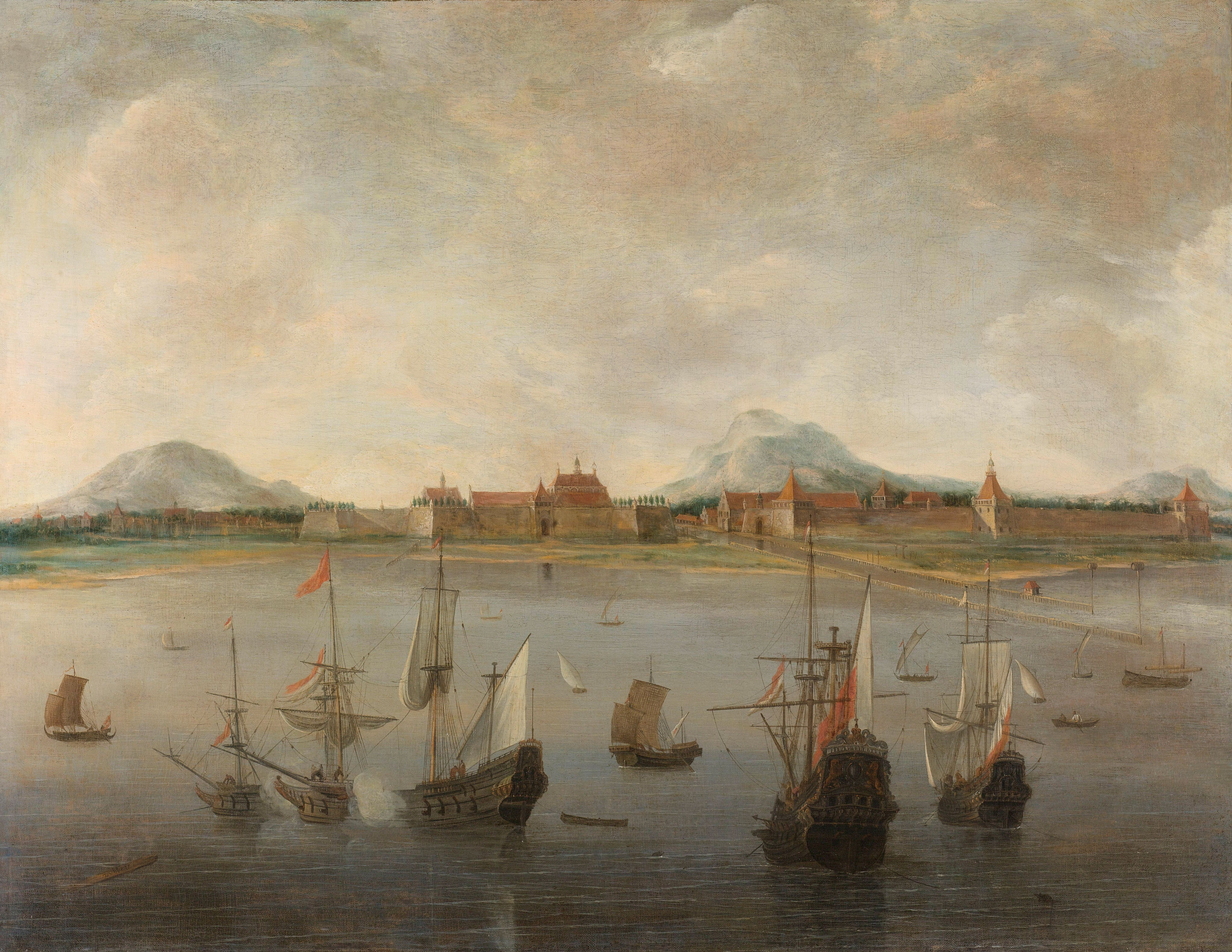 Gezicht op Batavia met de bergketen van de Salak, Pangerango en Gede. Gezien vanaf het water, met schepen van de Nederlandse vloot op de rede.